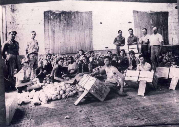 חבורת צעירים פתח תקוואים אורזים תפוזים באחד מבתי האריזה בעיר. הם הועסקו לשם כך על ידי מיכאל סלור.